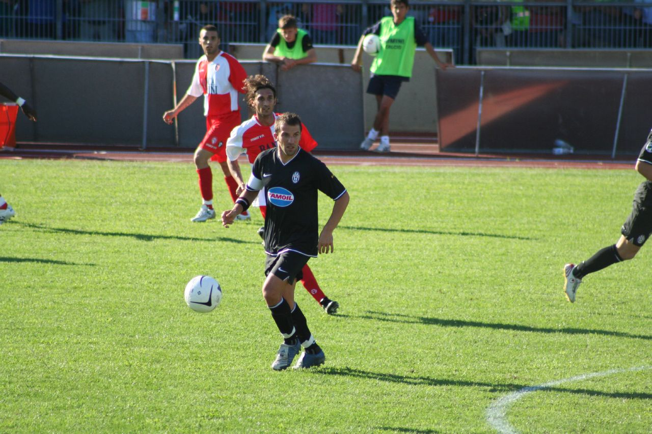 rimini-juventus, prima giornata di serie b 2006/07